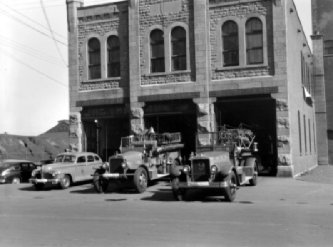 Commissariat des incendies. Casernes / Jacques Desjardins - Octobre 1946